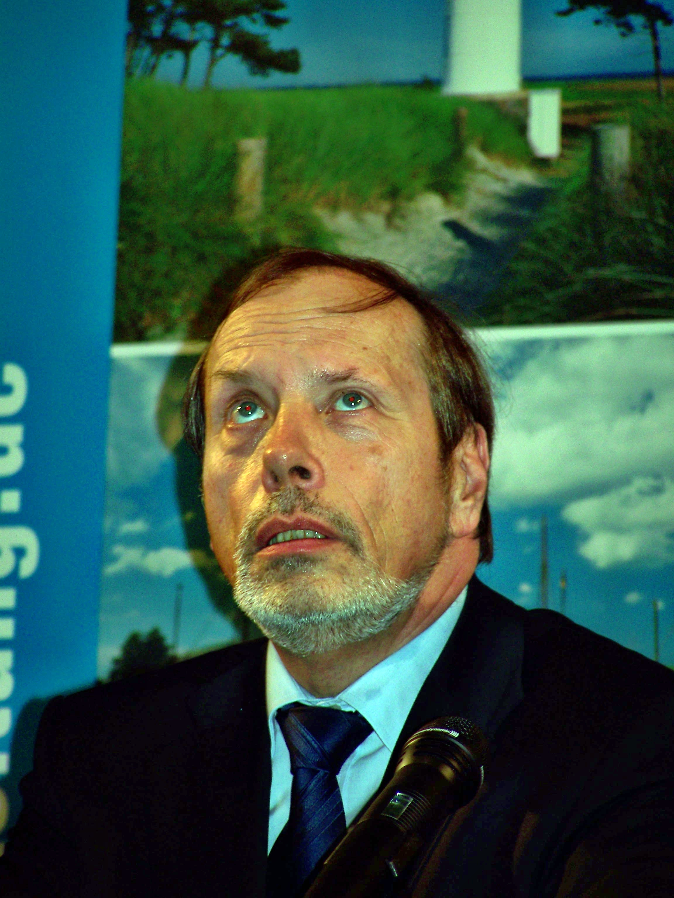 Stralsund. Anton Nekovar, bei einer Podiumsdiskussion zur Oberbürgermeisterwahl im Stralsunder Theater